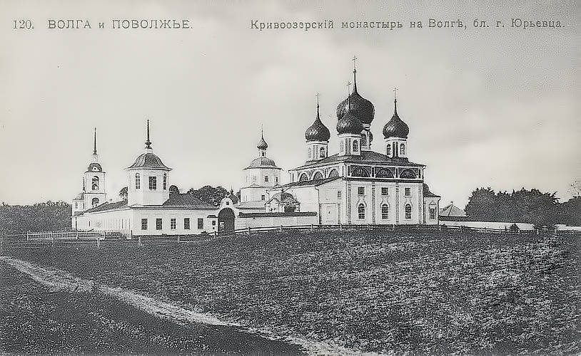 Krivoyezersky Monastery in Yurievets